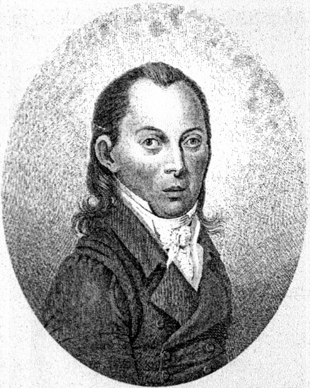 Friedrich Herrmann (1775–1819), Kupferstich